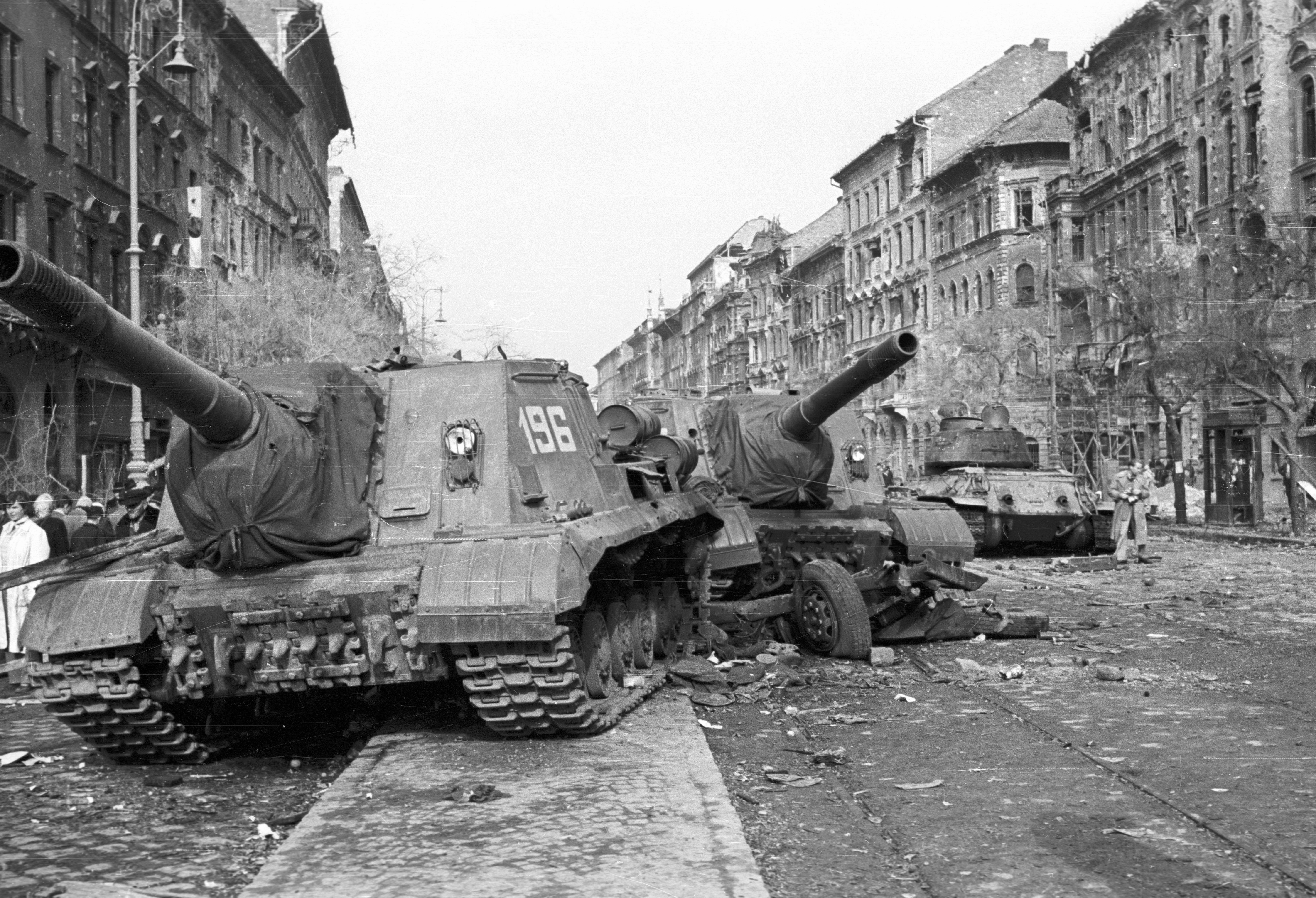 József körút a Corvin (Kisfaludy) köznél. Harcképtelenné tett ISU-152-es szovjet rohamlövegek, a háttérben egy T-34/85 harckocsi. Location: Hungary, Budapest VIII. Tags: wreck, Soviet brand, tank, revolution, ISU-152 assault gun, combat vehicle, war damage, Budapest Title: József körút a Corvin (Kisfaludy) köznél. Harcképtelenné tett ISU-152-es szovjet rohamlövegek, a háttérben egy T-34/85 harckocsi.